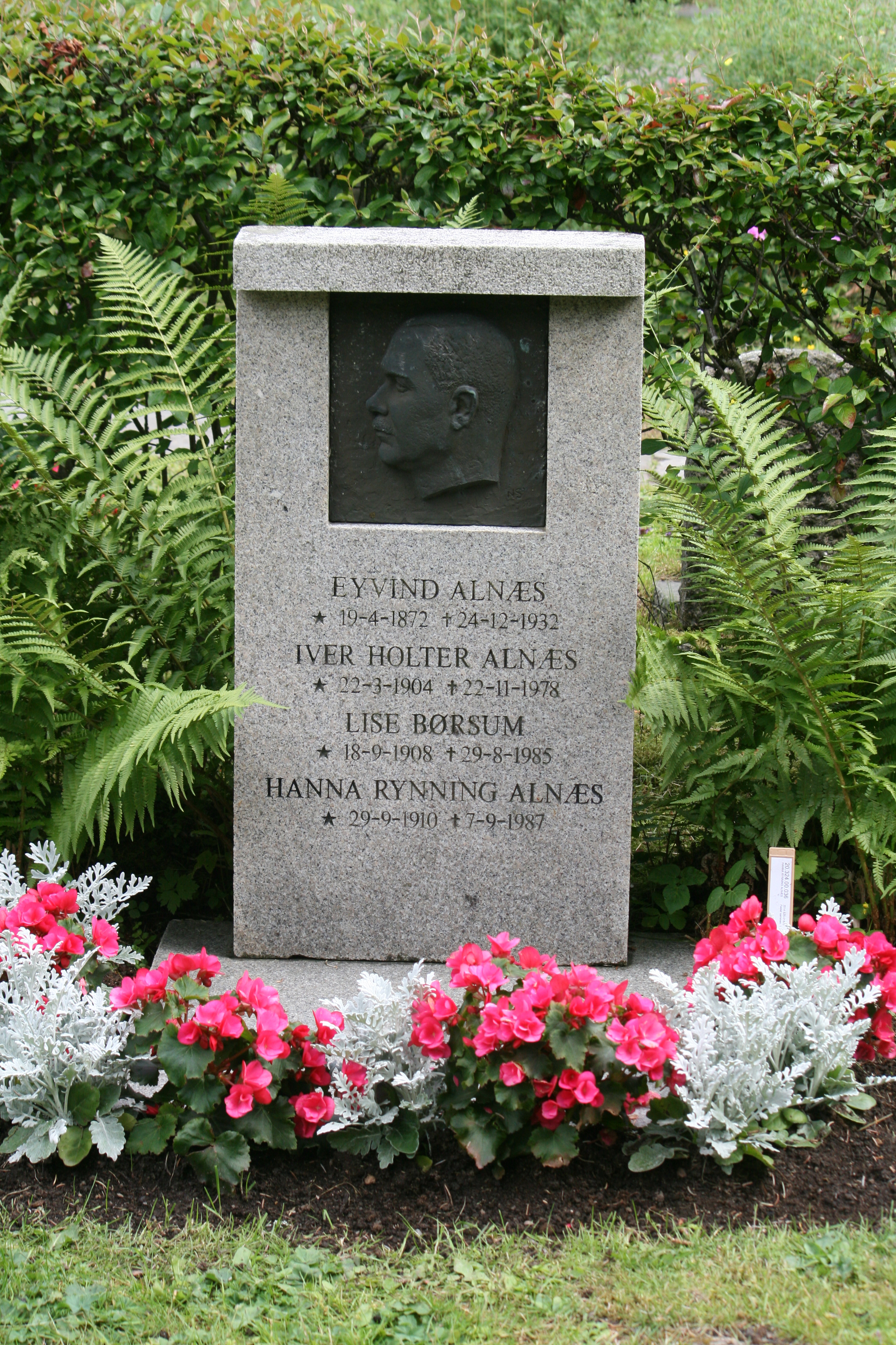 Grava til Eyvind Alnæs, Lise Børsum m.fl på Vestre gravlund i Oslo